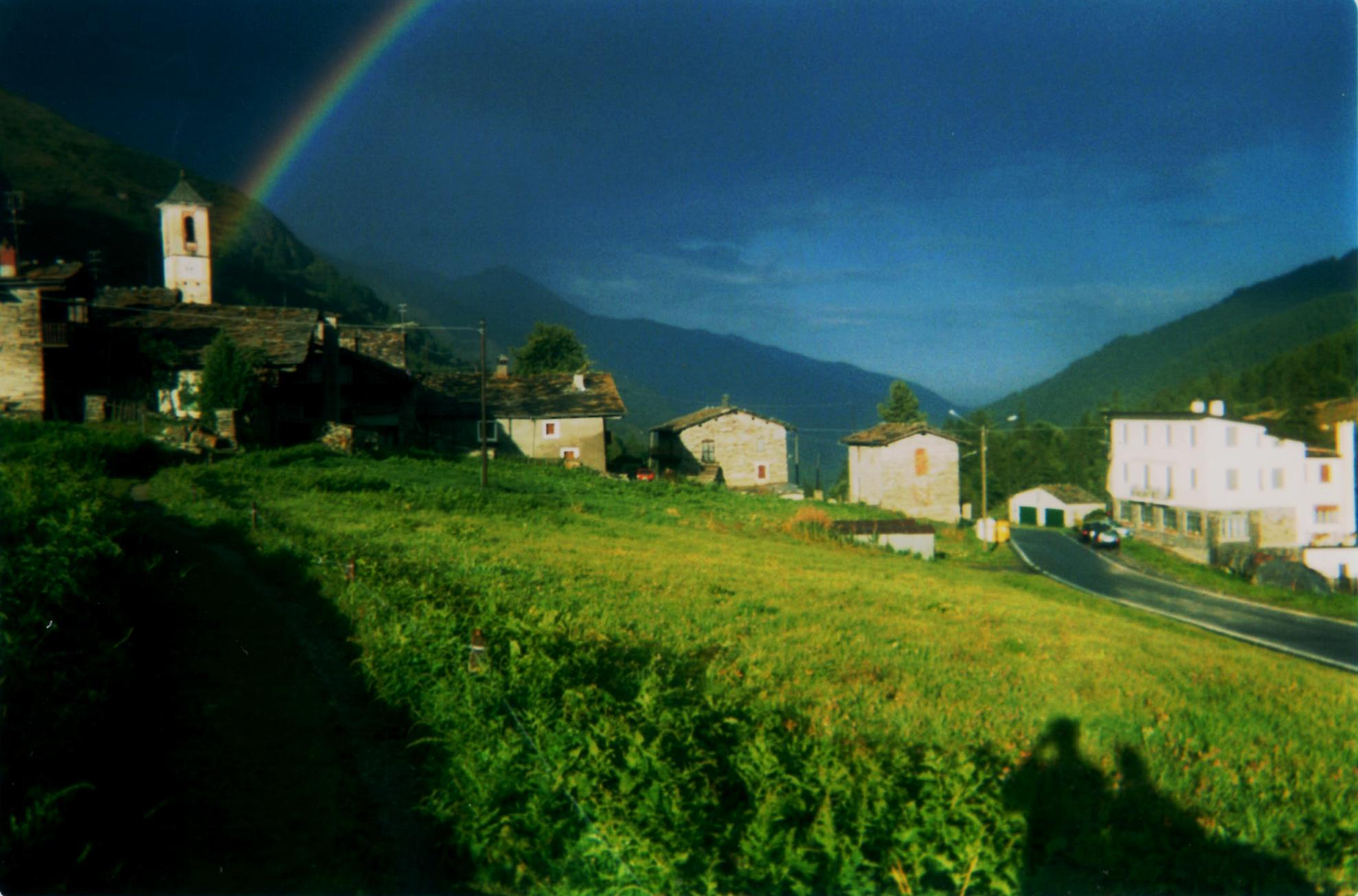 Immagine panoramica della borgata Celle nel Comune di Bellino